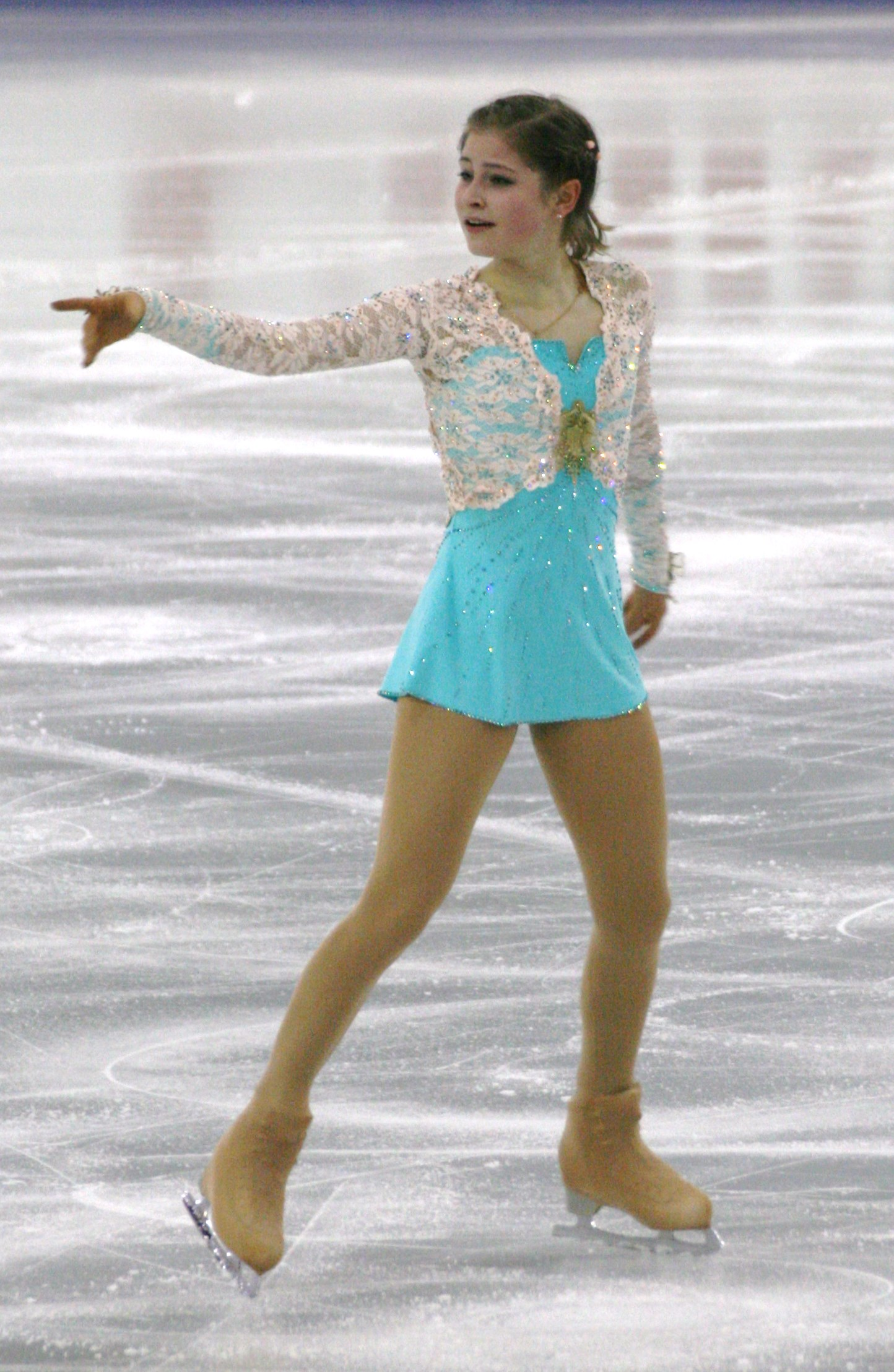 Юлия Липницкая (Россия) в финале Гран-при 2014-2015.